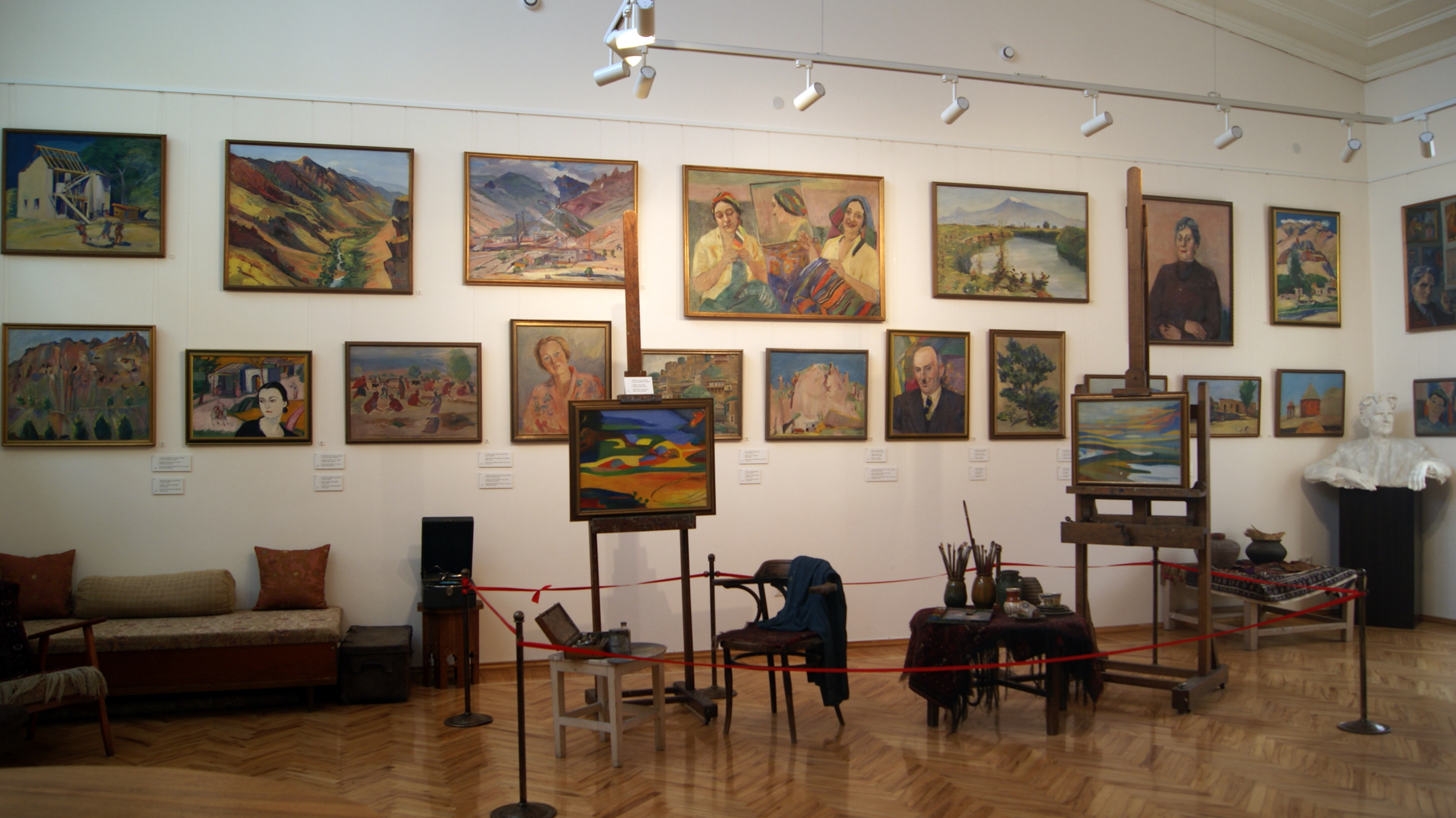 M. Saryan museum after reconstruction 6/175